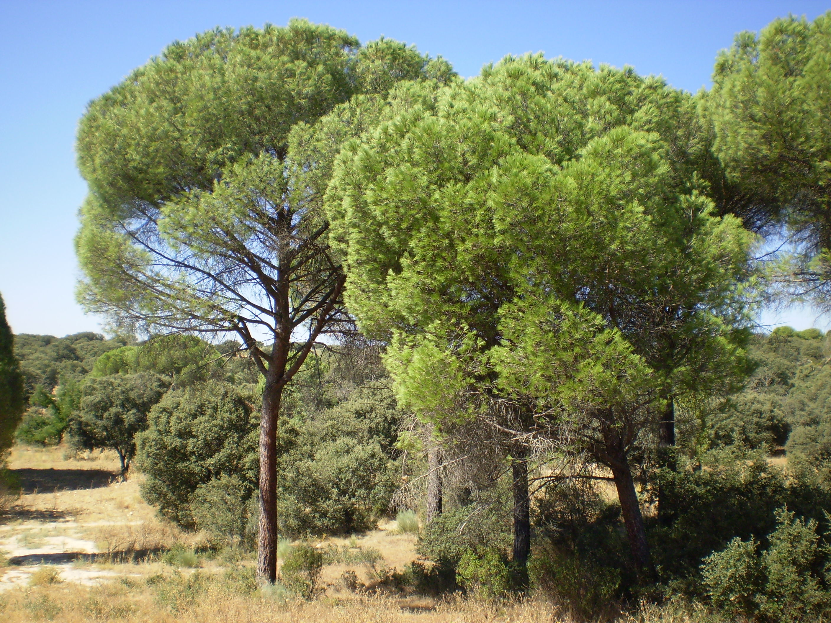 Parque Regional del curso medio del río Guadarrama. Sevilla la Nueva (Community of Madrid)